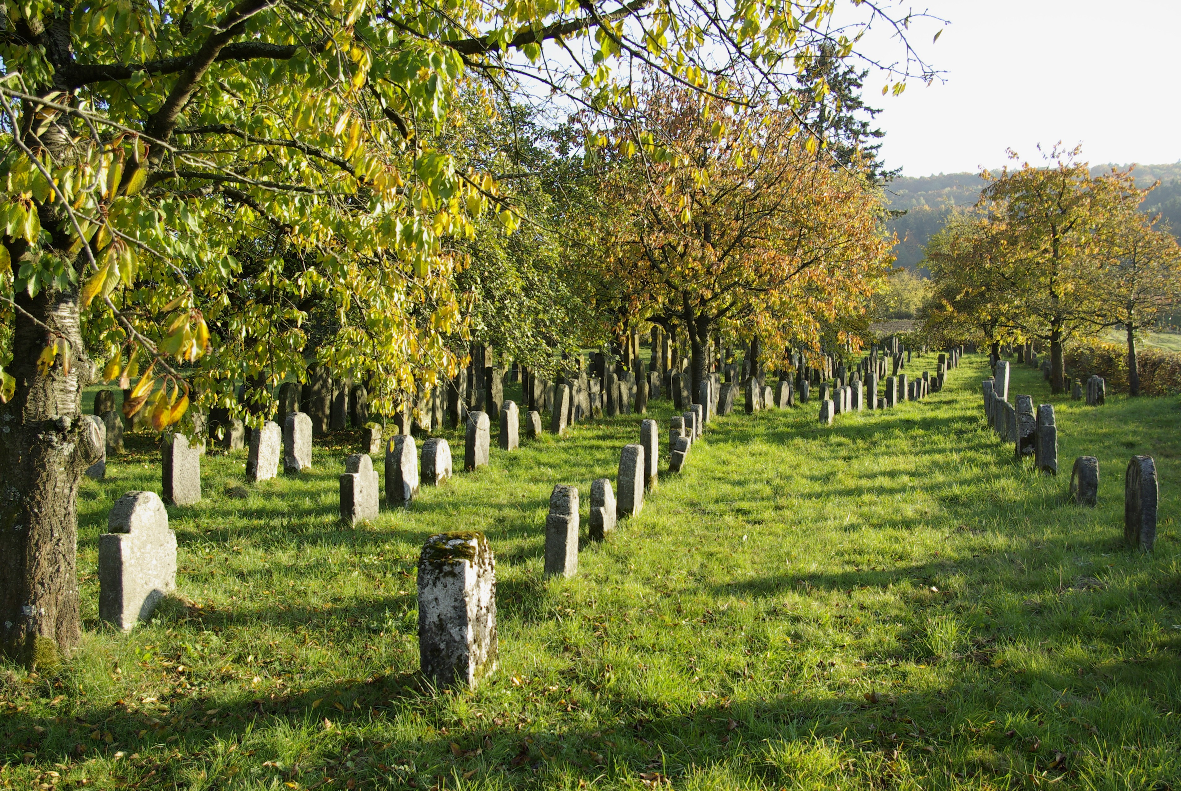 Jüdischer Friedhof in Hagenbach